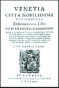 Copertina dell'edizione anastatica, pubblicata da Leading Edizioni, Bergamo